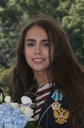 Дмитрий Медведев и чемпионка Игр XXXI Олимпиады в Рио-де-Жанейро по художественной гимнастике Маргарита Мамун